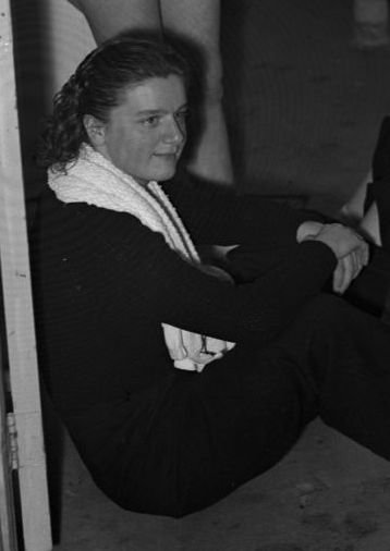 Zwemsters Dicky van Ekris en Geertje Wielema (staand), Greetje Galliard en ? (zittend) in de kleedkamer van het Sportfondsenbad-West, Pieter van der Doesstraat, Amsterdam, 20 maart 1949 Foto Ben van Meerendonk / AHF, collectie IISG, Amsterdam